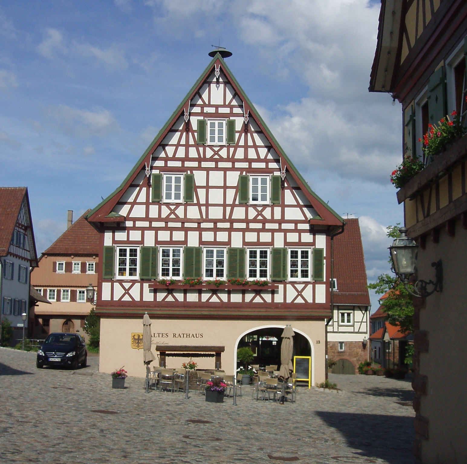 Altes Rathaus Neubulach